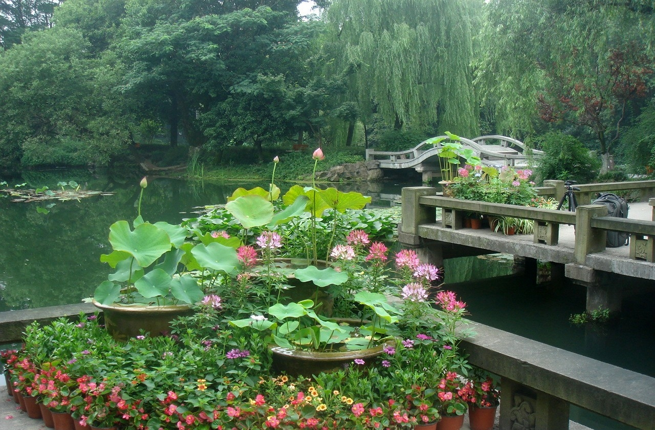 杭州.曲院风荷（荷花展）